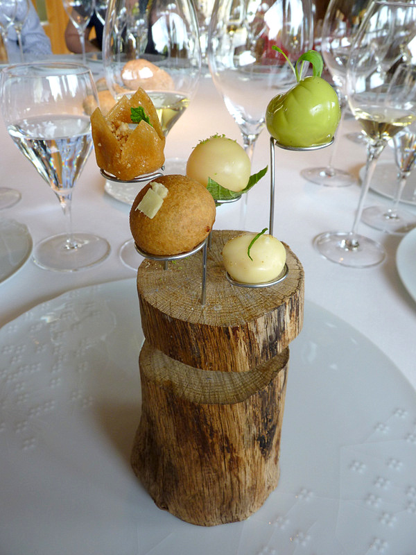 Menjar el món: Perú, Líban, Marroc i Corea